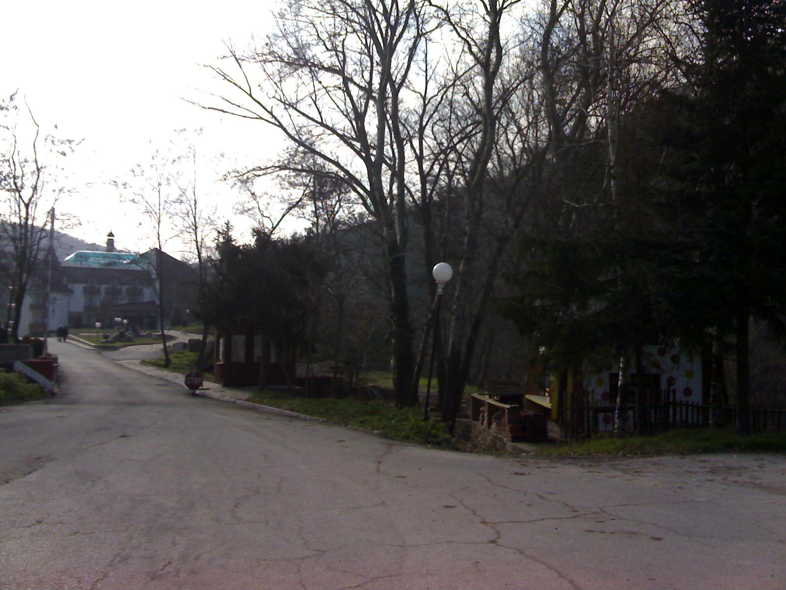 Областта "Приказките", Харманли